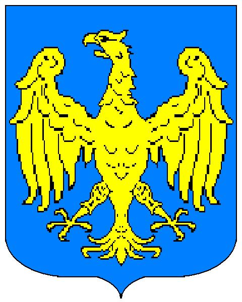 Grb obitelji Cipci